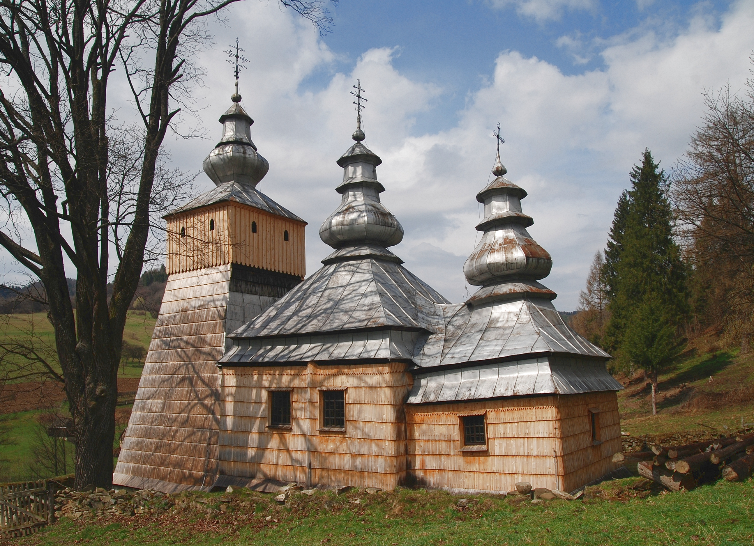 wieś Dubne